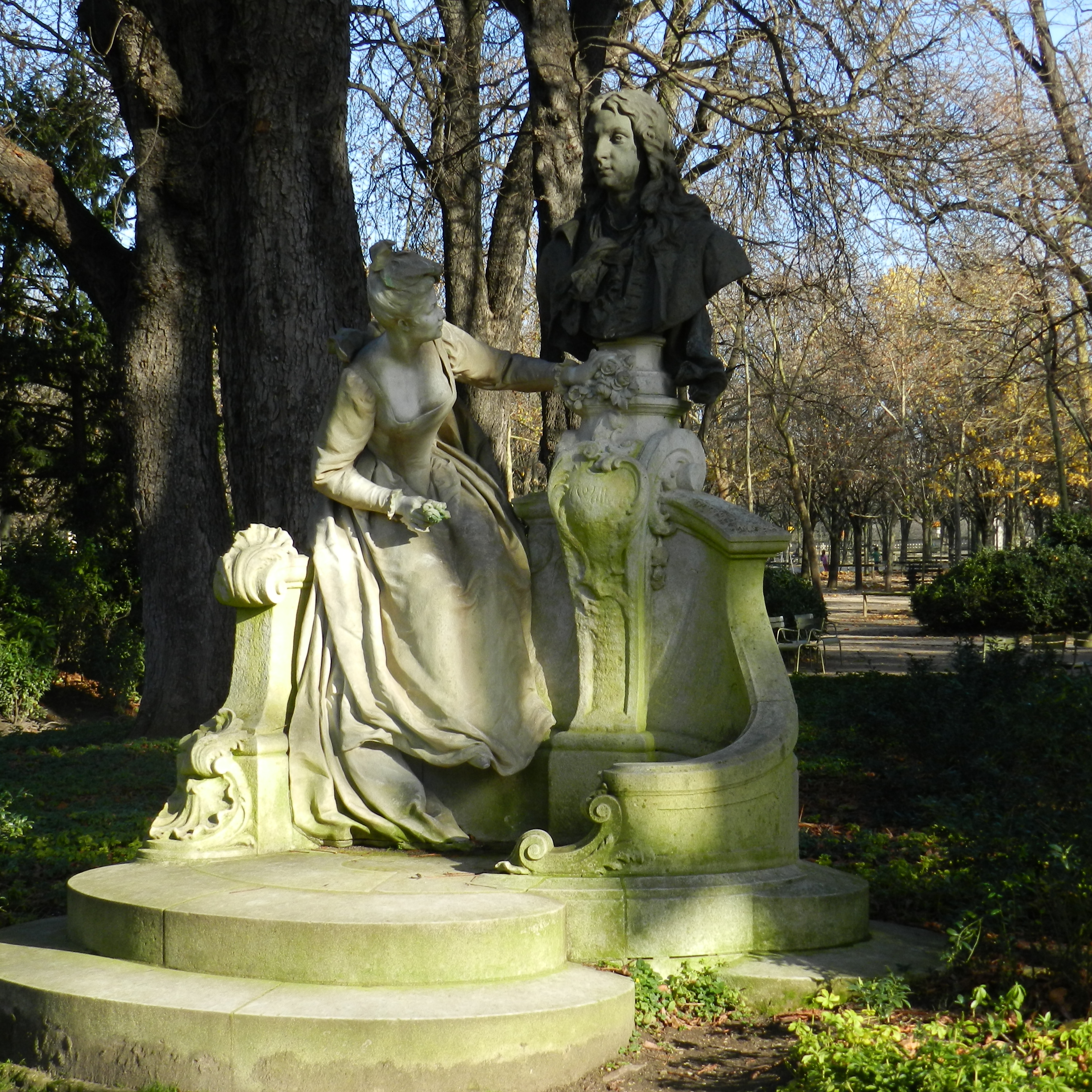 Monument à Watteau by Henri Désiré Gauquié, Jardin du Luxembourg, Paris.